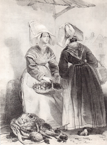 Sous Louis Philippe - La catiole - Rennes